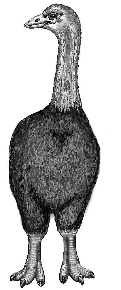 Aepyornis maximus (dessin)